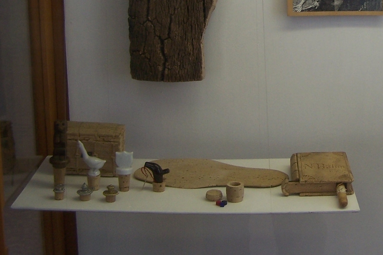 Dermbach